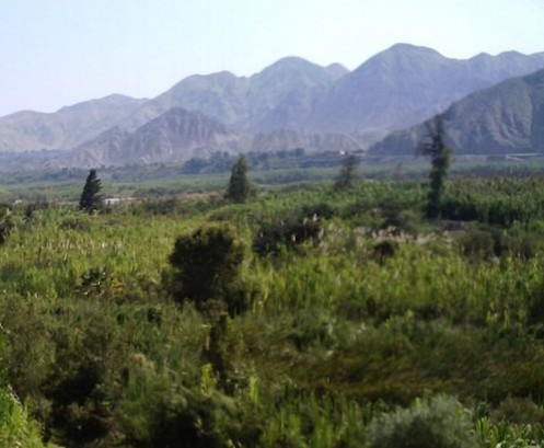 La Hermozavista de Ramadilla